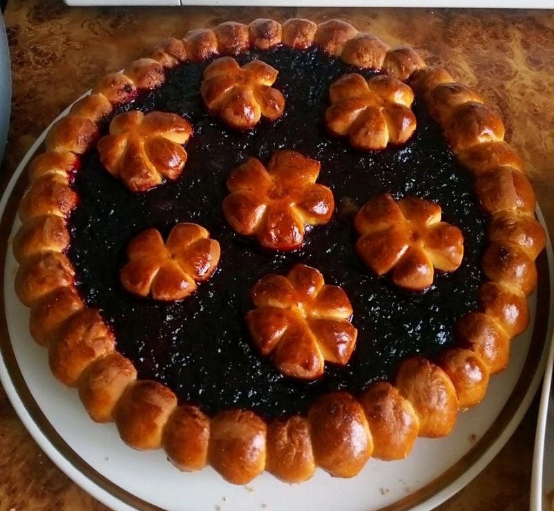 Bird cherry pie. Siberia